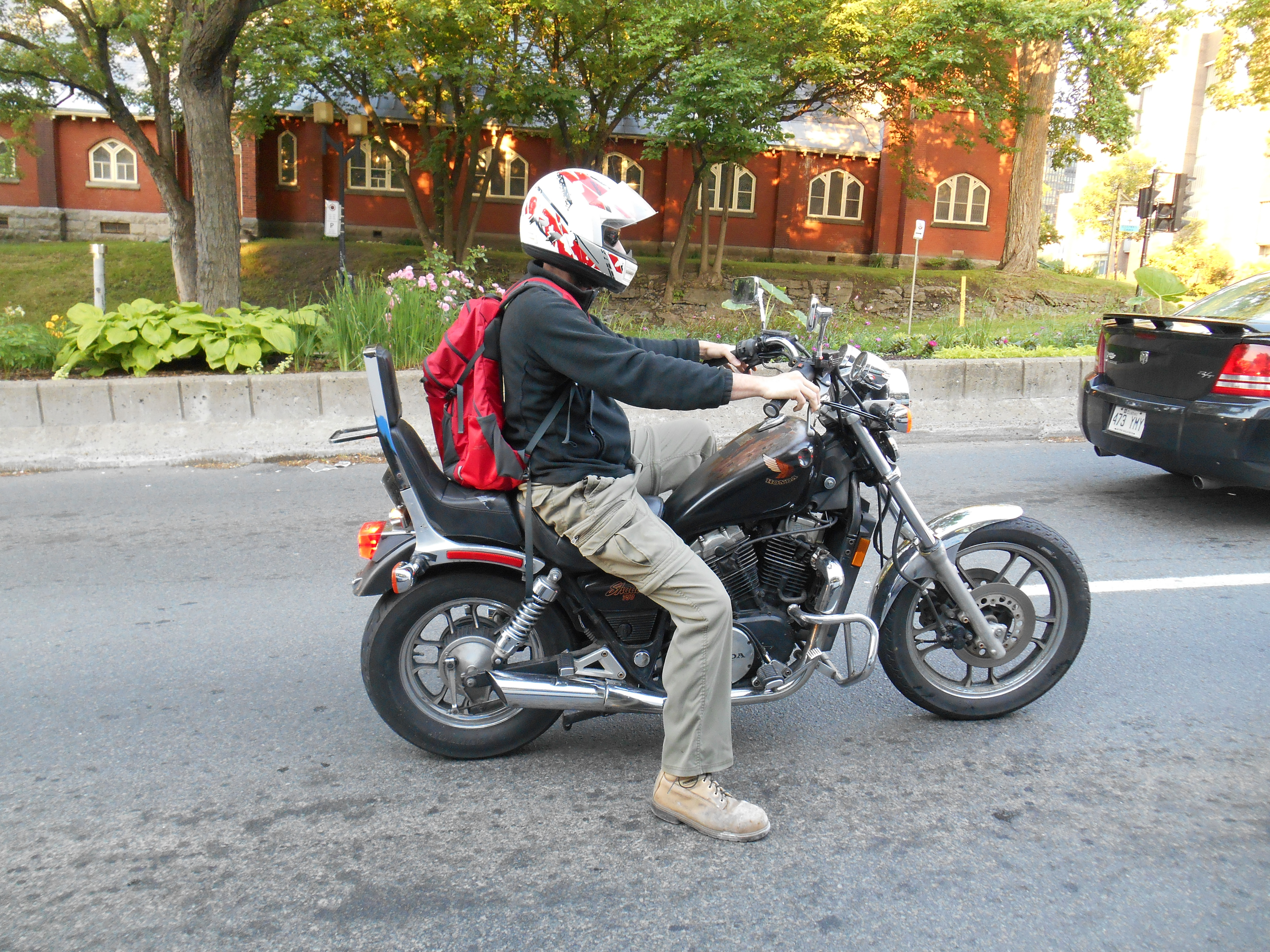 Honda VT 750, église Saint Stephens, avenue Atwater, Montréal